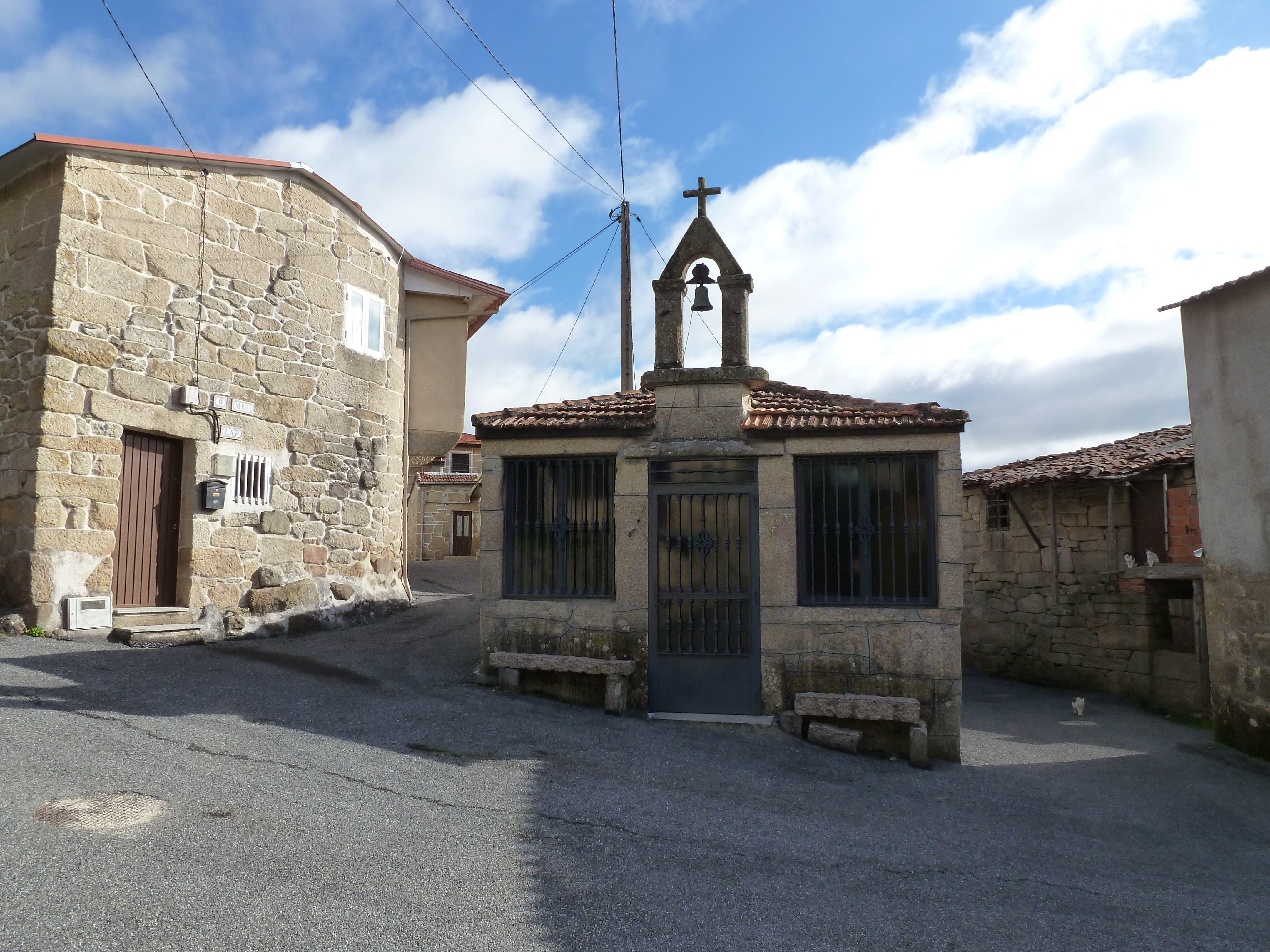 Padroso, Sarreaus